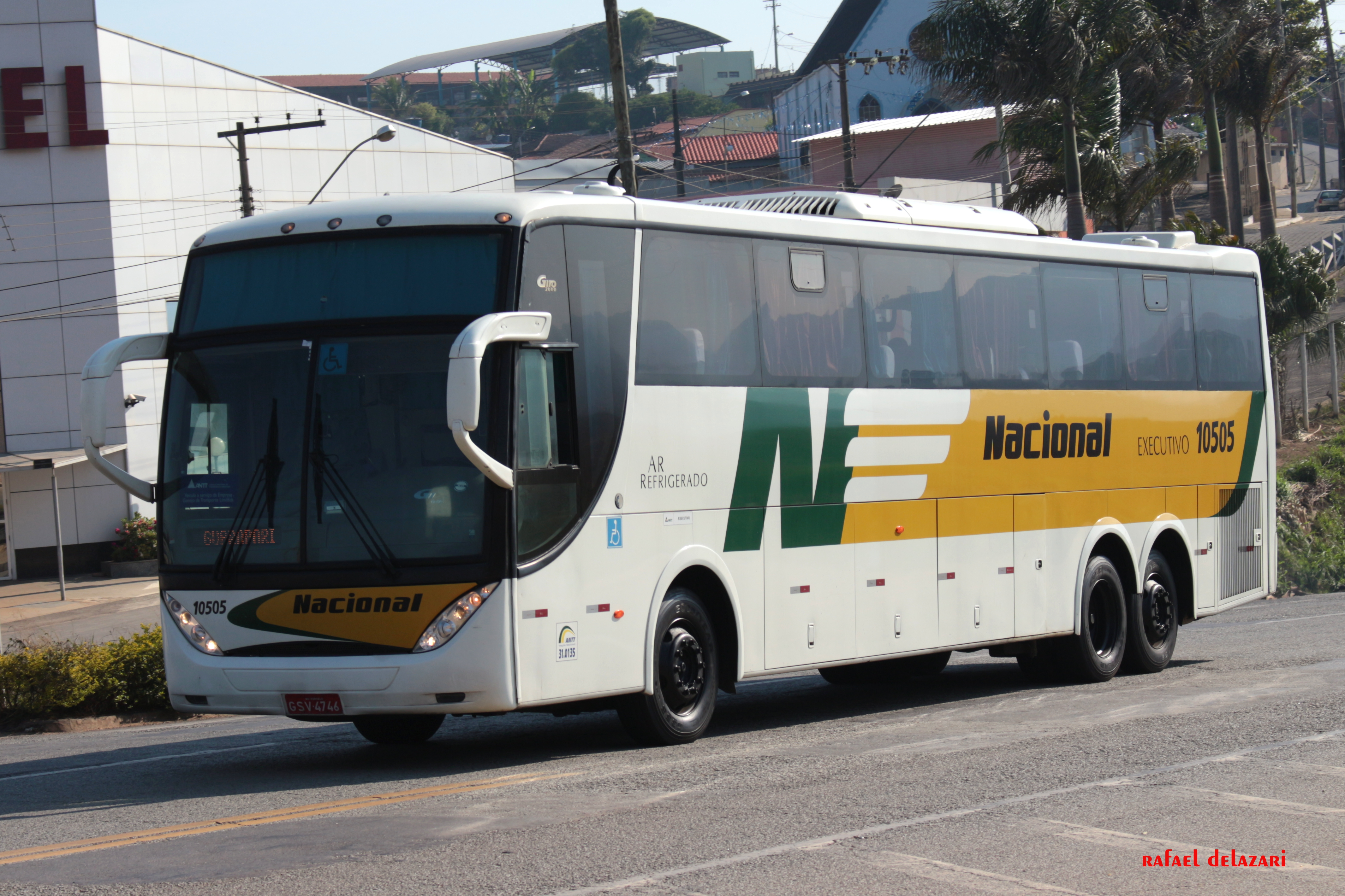 Nacional - 10505